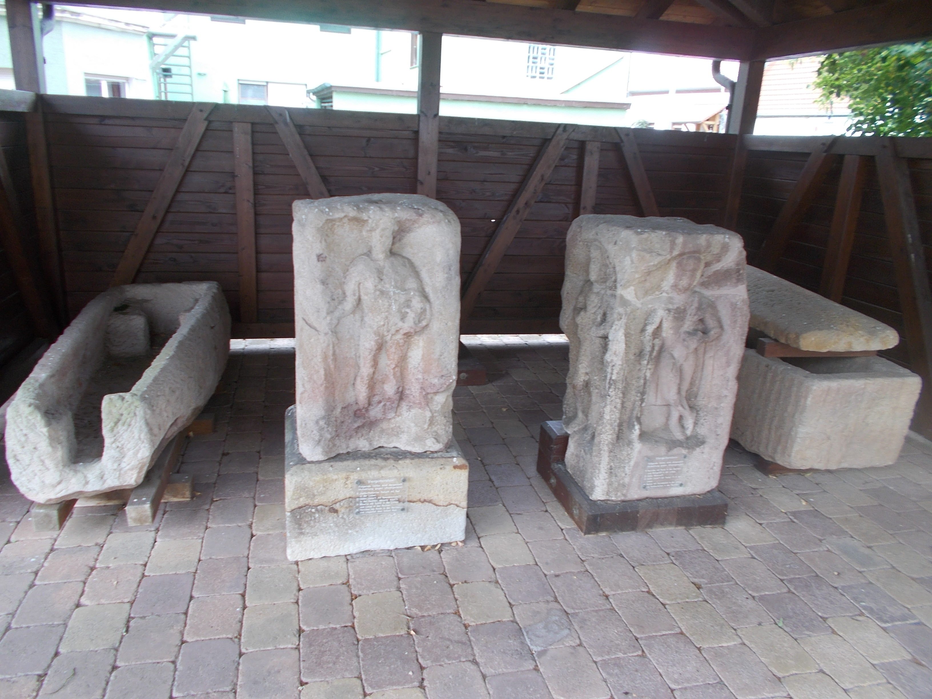 Viergöttersteine auf dem Kirchplatz der Protestantischen Kirche Glan-Münchweiler